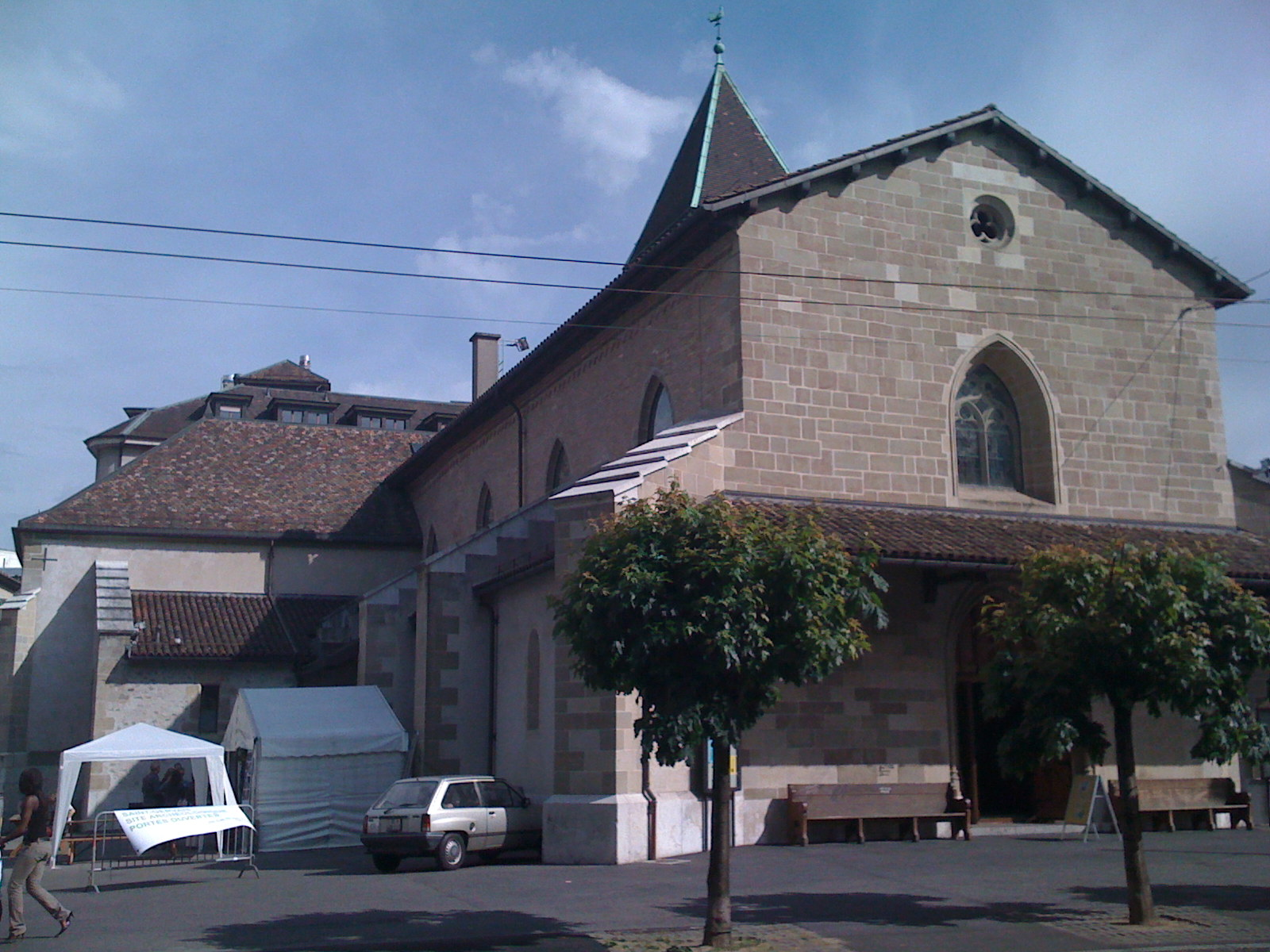 Façade occidentale du temple de Saint-Gervais à Genève (Suisse)